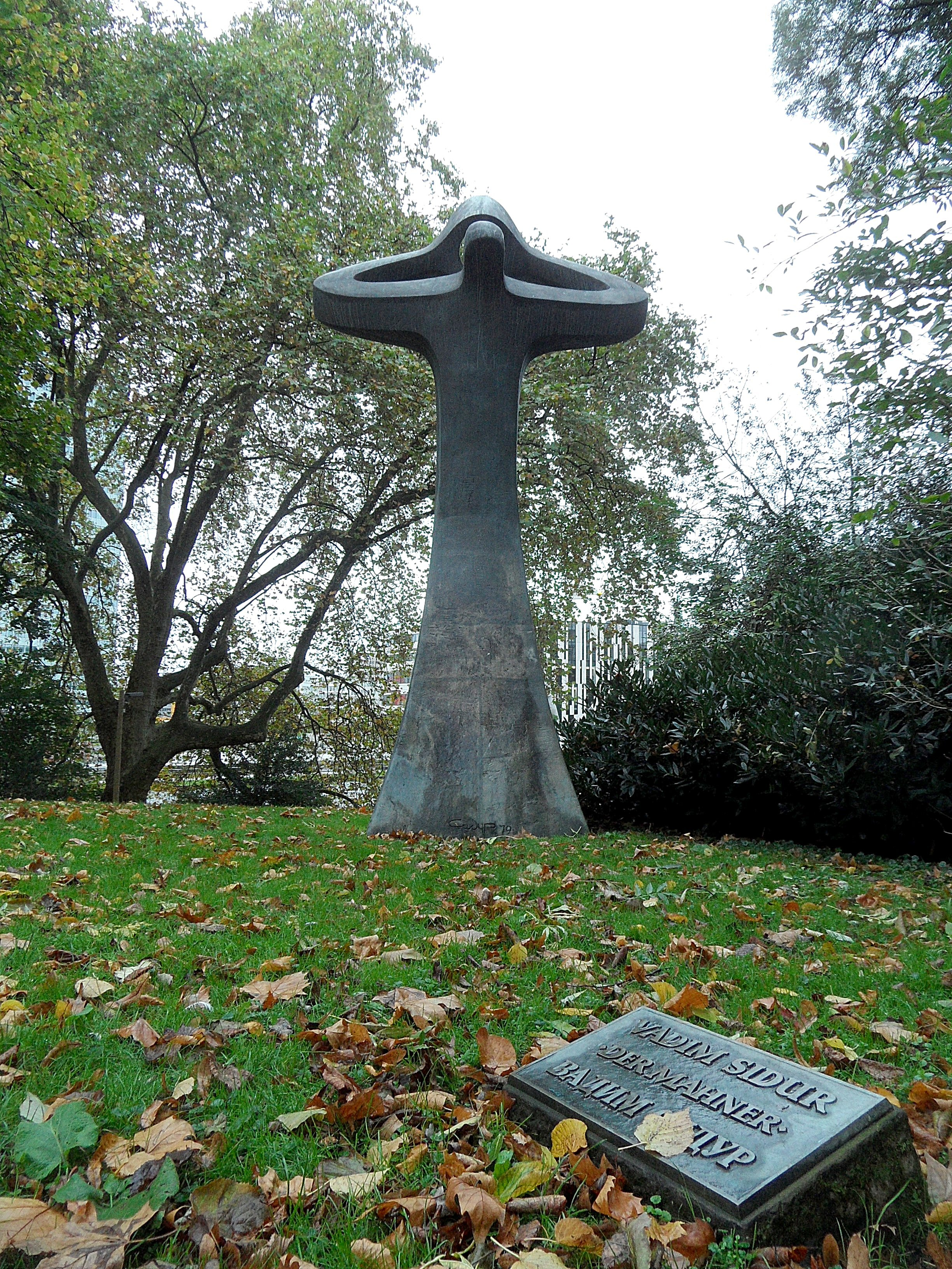 Düsseldorf: Hofgarten, Bronzeskulptur "Der Mahner", Künstler: Vadim Sidur (1924-1986); Oktober 2017